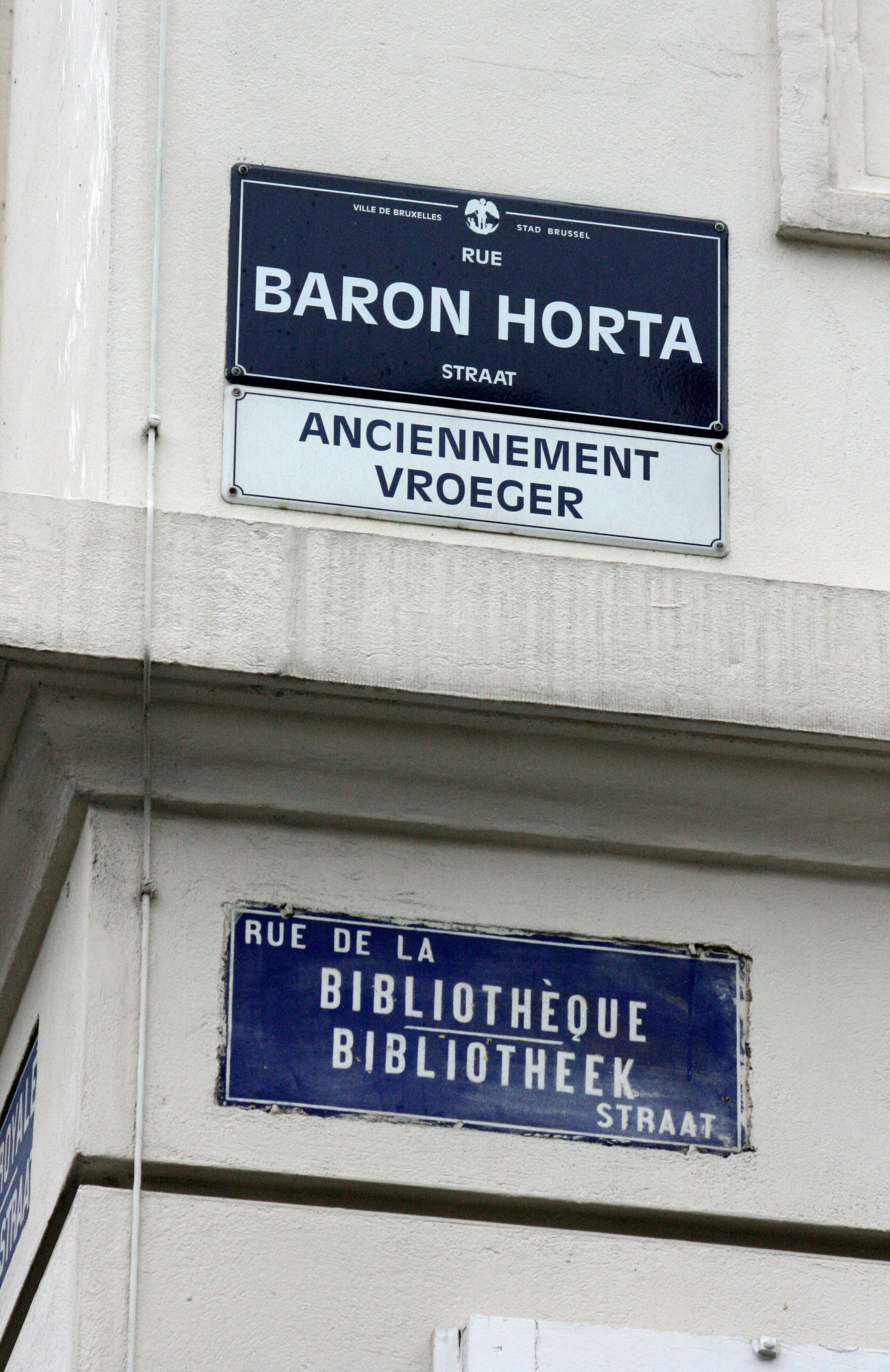 Rue Baron Horta, Bruxelles (Belgique). Plaque rappelant l'ancien nom de la rue : rue (ou passage) de la bibliothèque